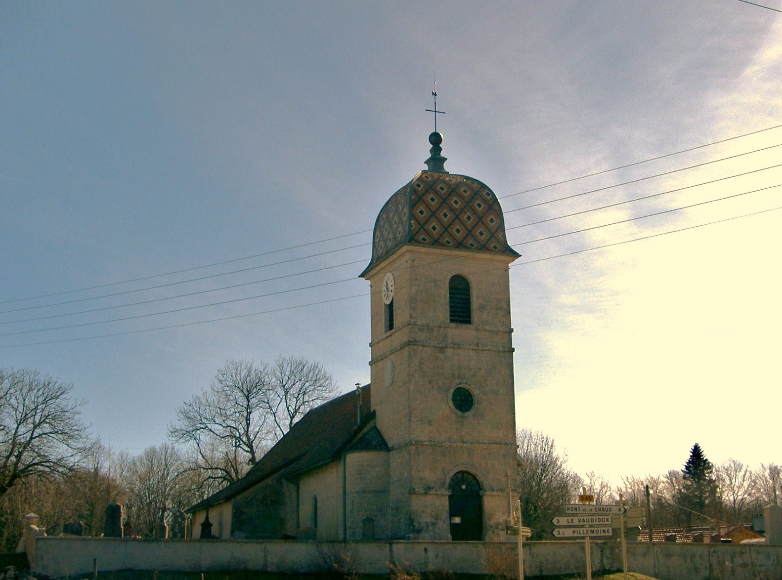 Chatelneuf, département du Jura (39) France : église du 14e siècle et son dôme franc-comtois